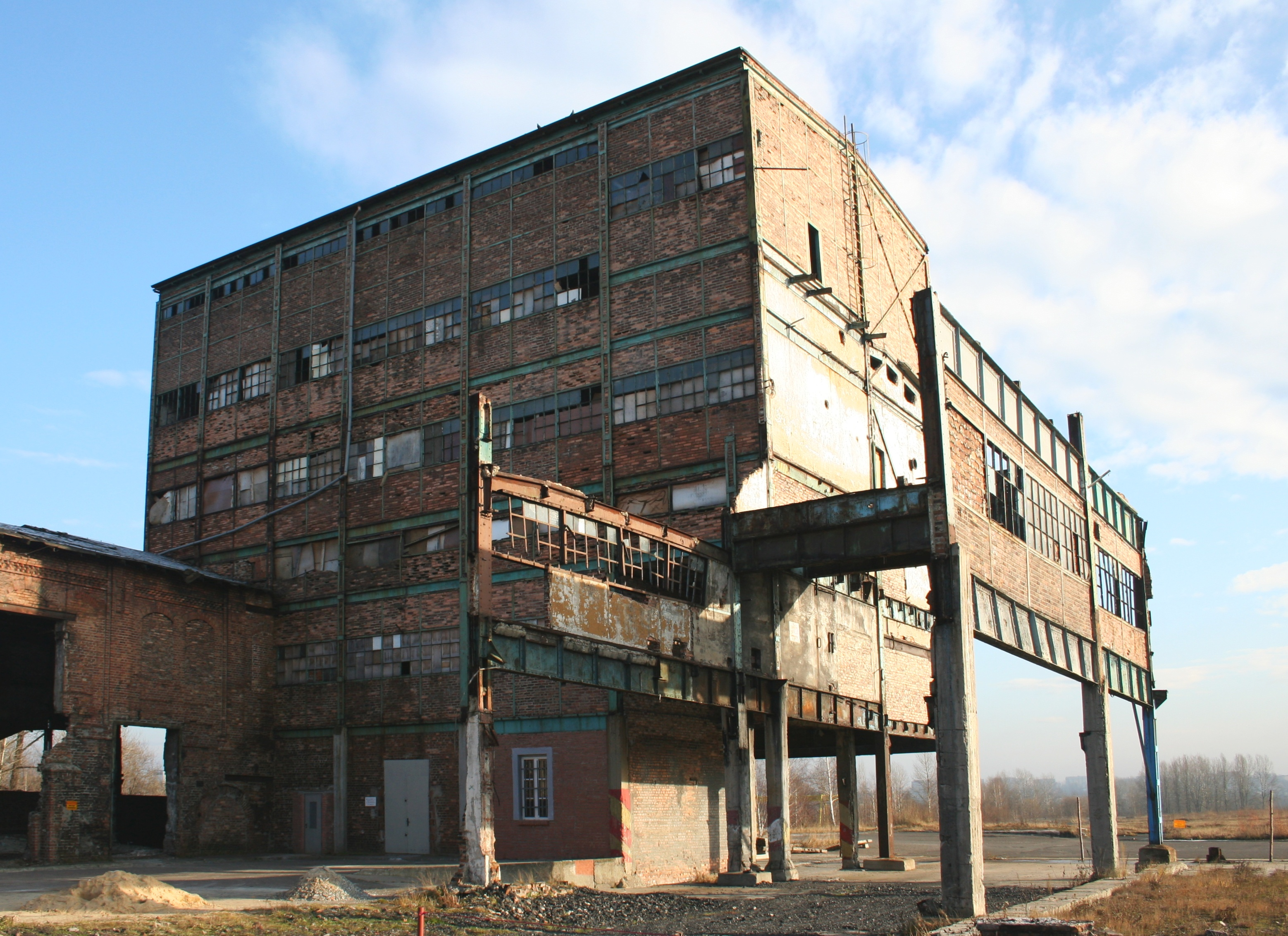 budynek sortowni (dawnego szybu Wilson-KWK Wieczorek), w sąsiedztwie Galerii "Szyb Wilson"